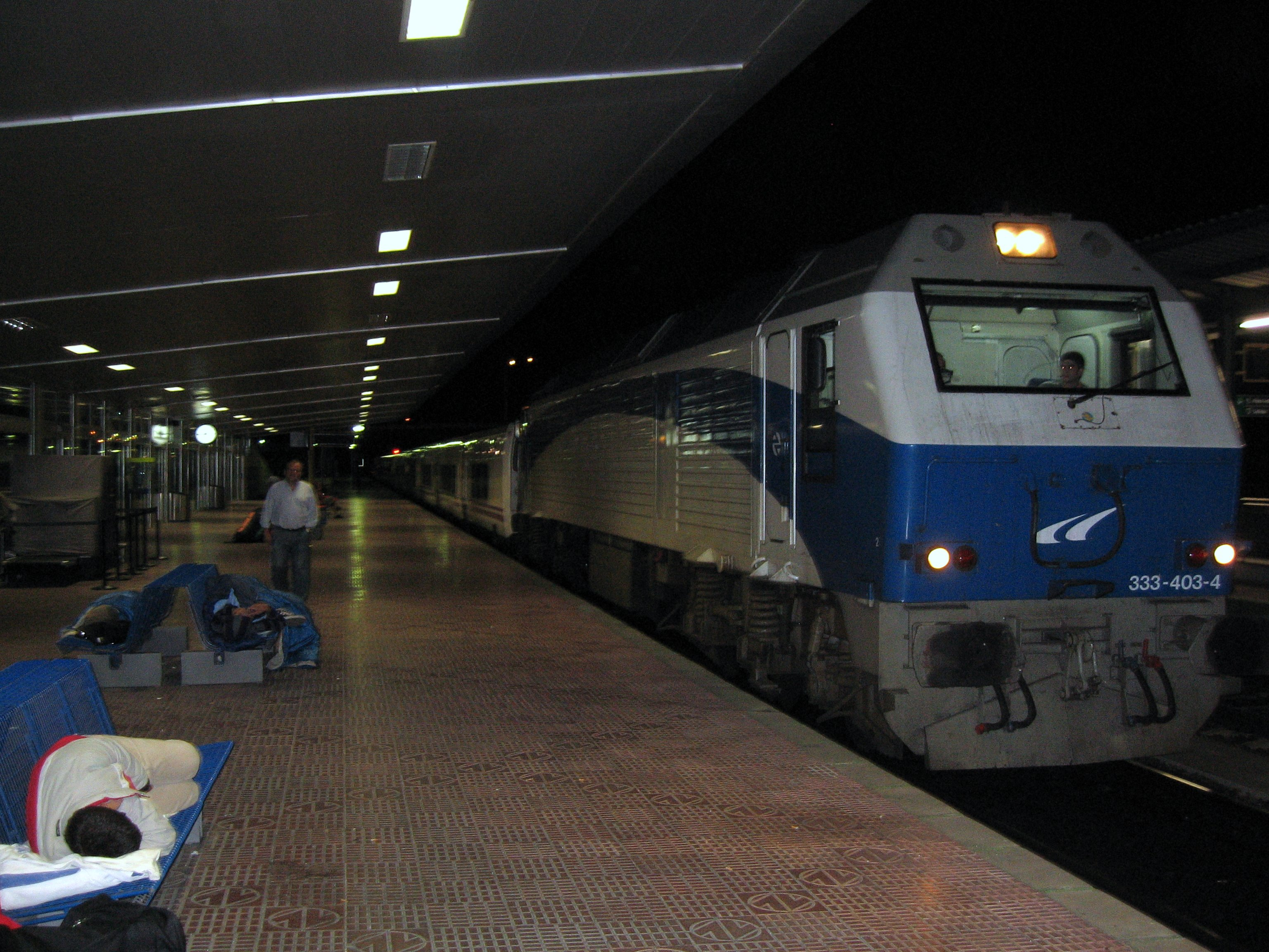 El Lusitania Madrid-Lisboa en la Via 1 de la Estación de Salamanca realizando el cambio de maquinista a la 1:45. Esta es una imagen que extraordinariamente se puede ver desde el mes de Enero ya que la vía de Cáceres a Valencia de Alcantara está siendo reformada.